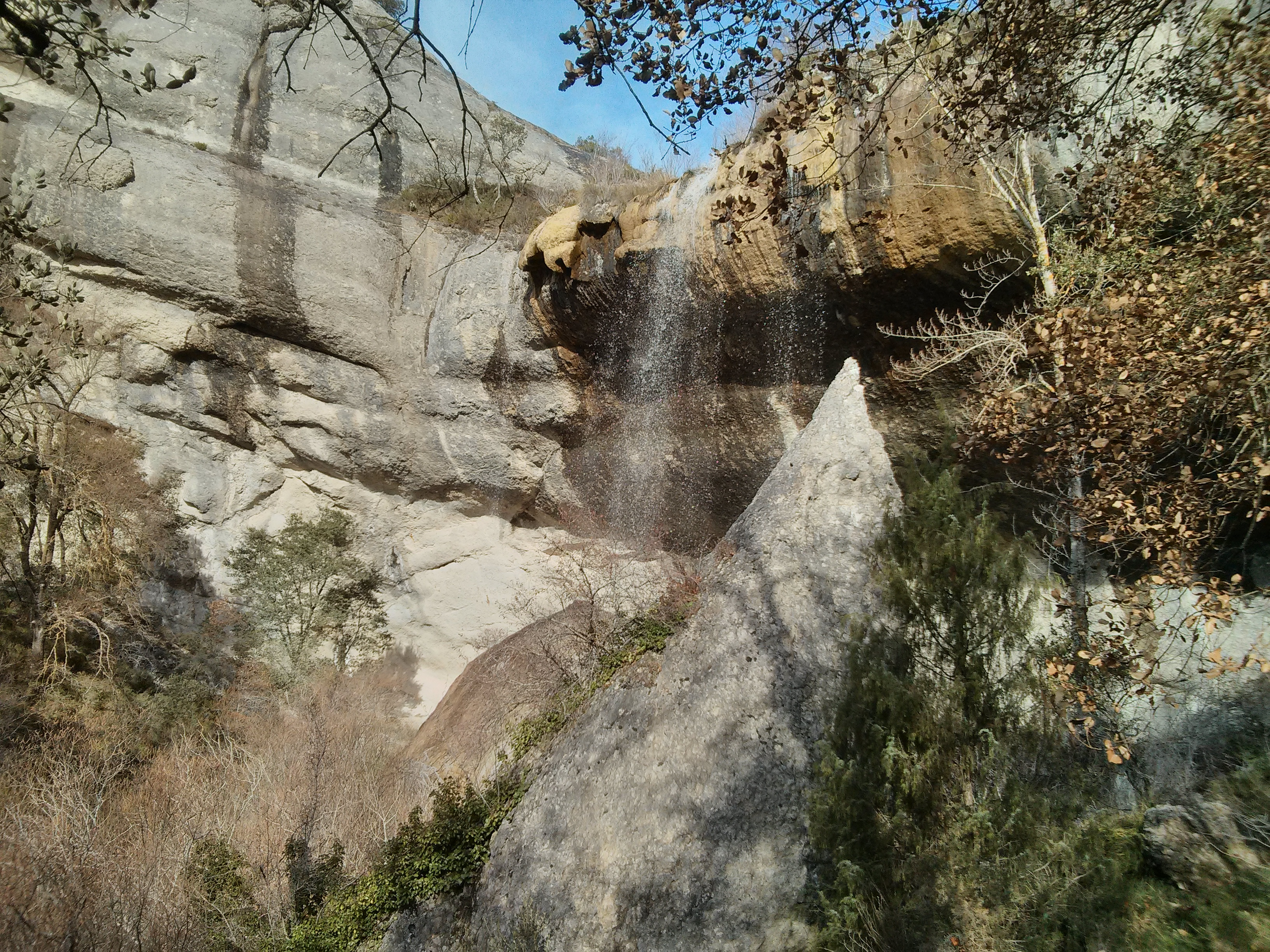 Panorámica